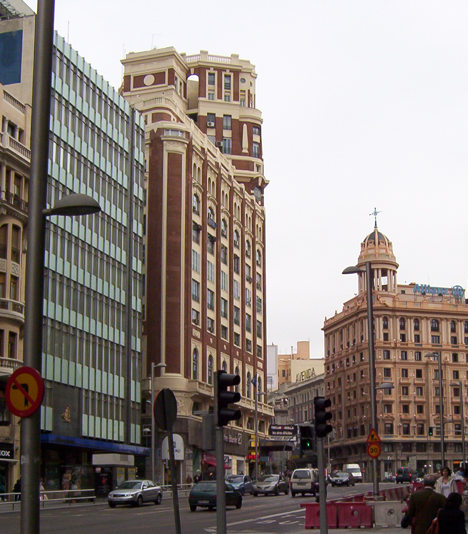 Gran vía